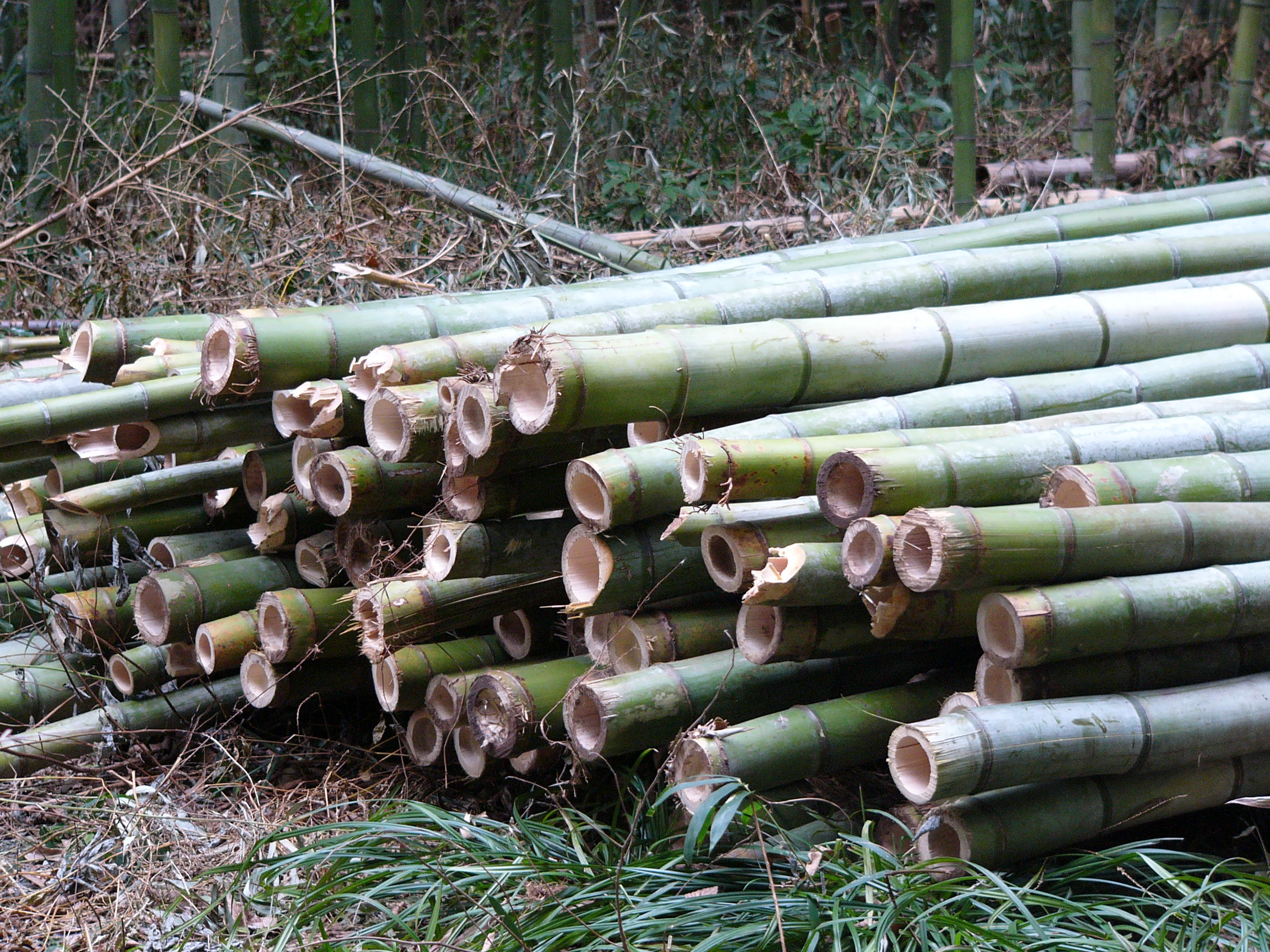 Cut bamboo, Sagano-Arashiyama